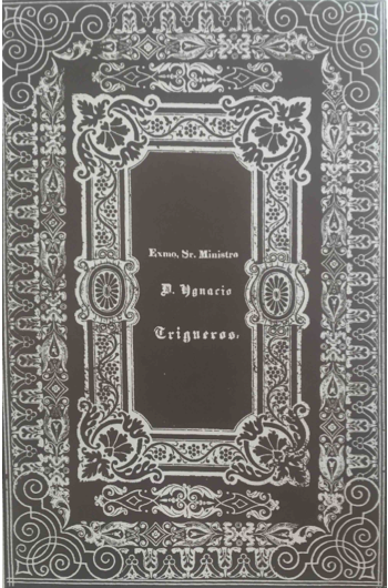 Álbum de Ignacio Triguero, Ma. Teresa Bermudez